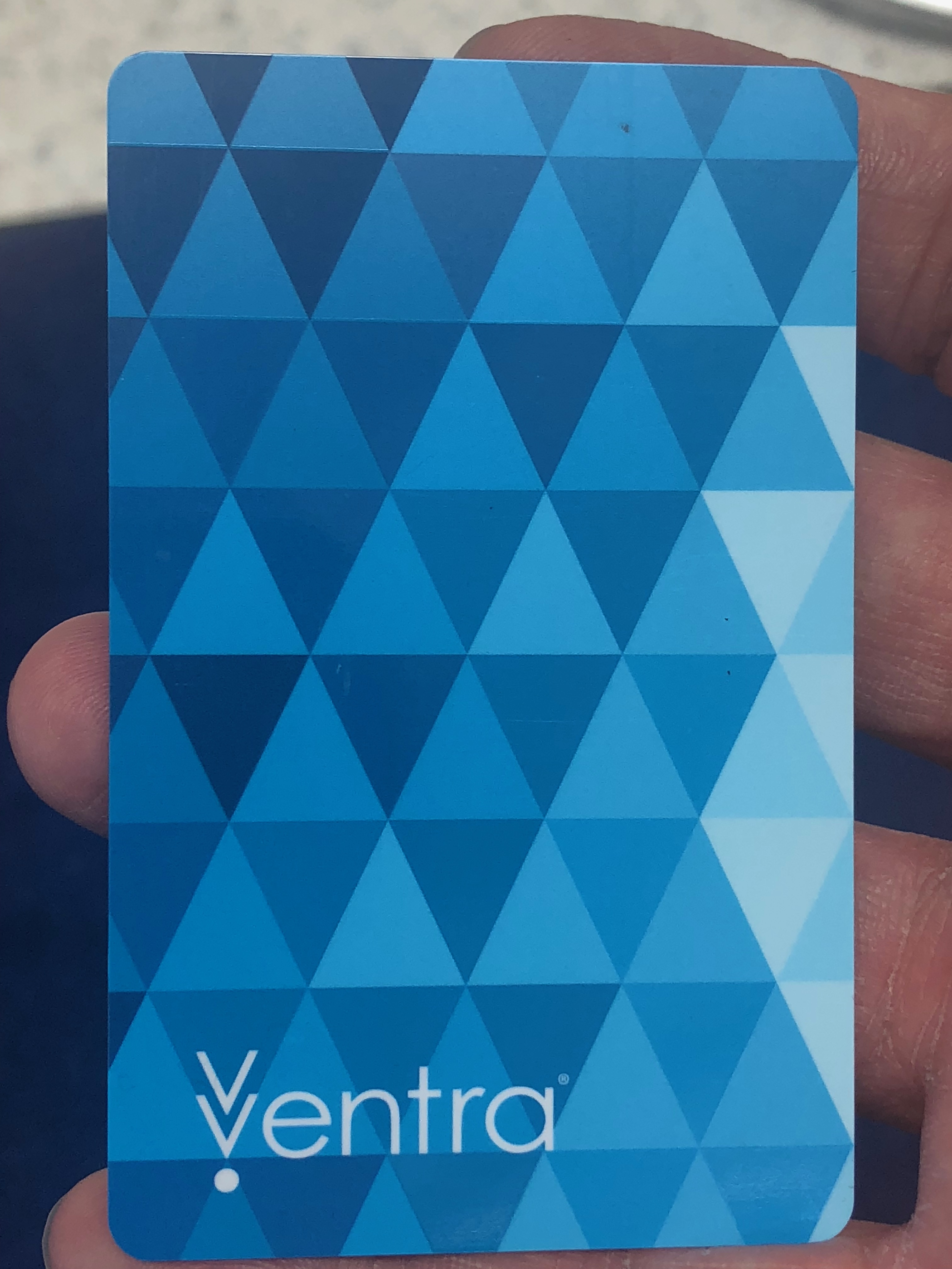 Ventra Card(プラスティックタイプ)